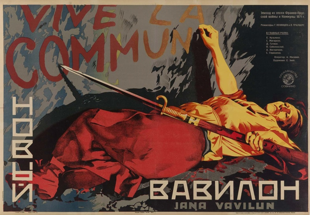 Плакат к советскому художественному фильму «Новый Вавилон» (Производство Совкино, реж. Григорий Козинцев, Леонид Трауберг). Москва: Издание Совкино, 1929. Хромолитография